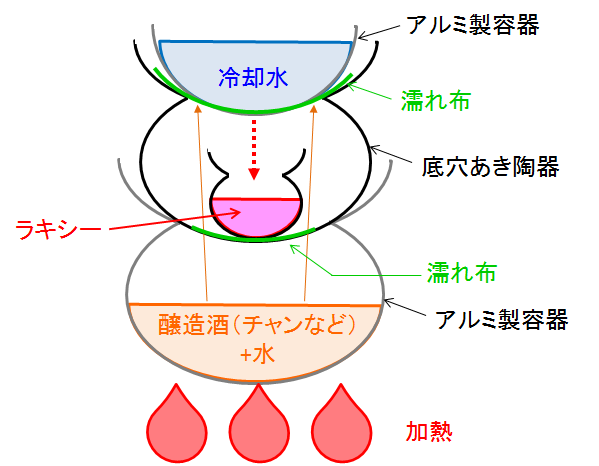 ラクシーの蒸留模式図。日本醸造協会誌、2000年、95巻2号、P.121などを参考に作成。